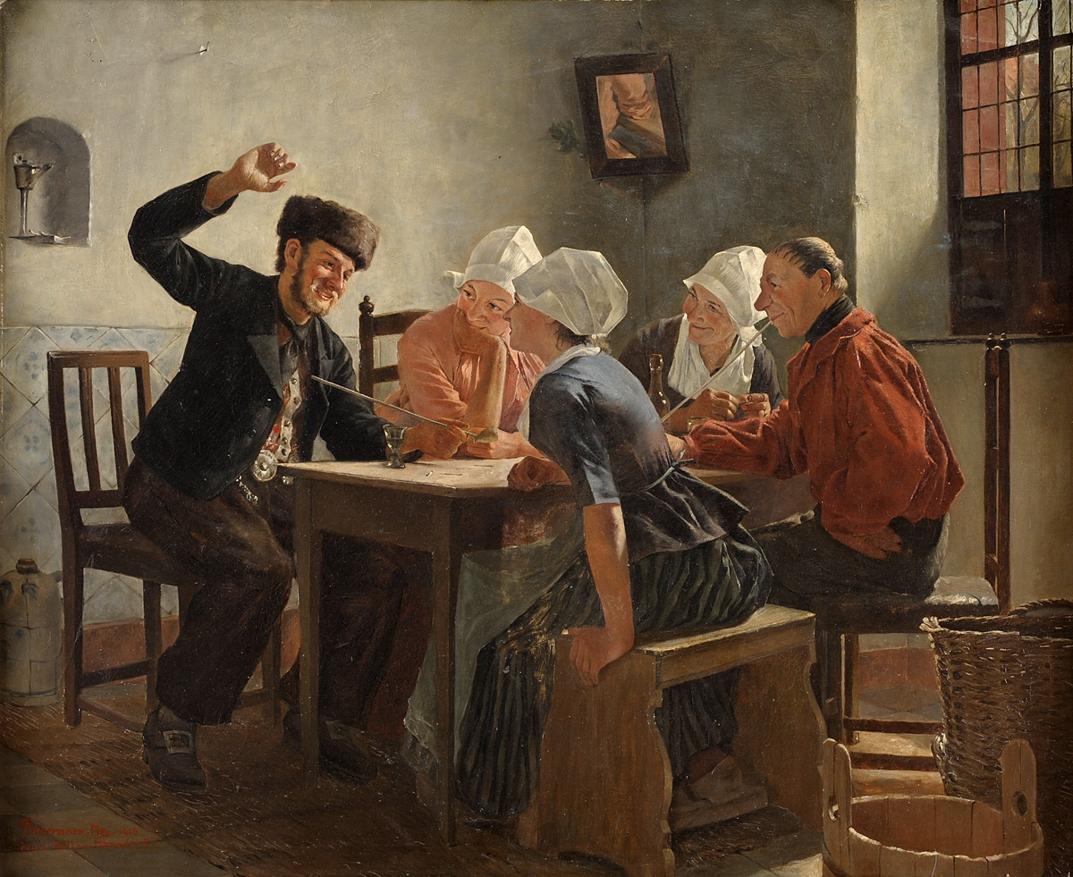 Eine interessante Geschichte. Öl auf Leinwand, 90 x 110 cm